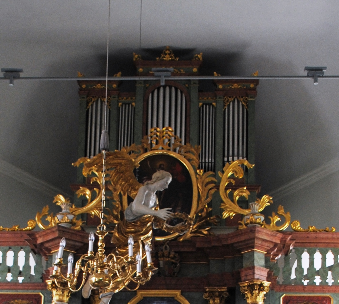 Orgel, Rüdenhausen, Kirche